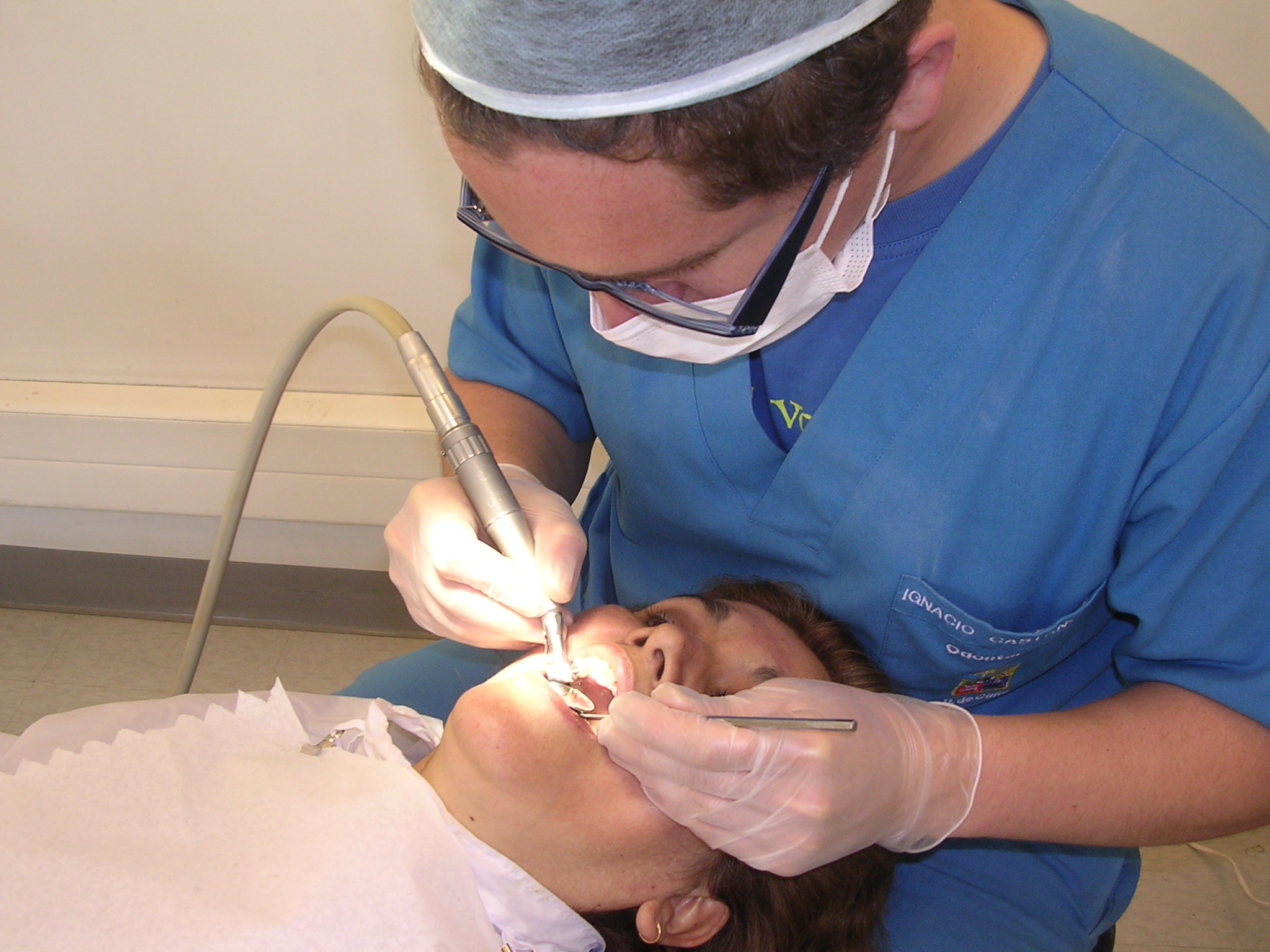 La Facultad de Odontología entrega atención dental.